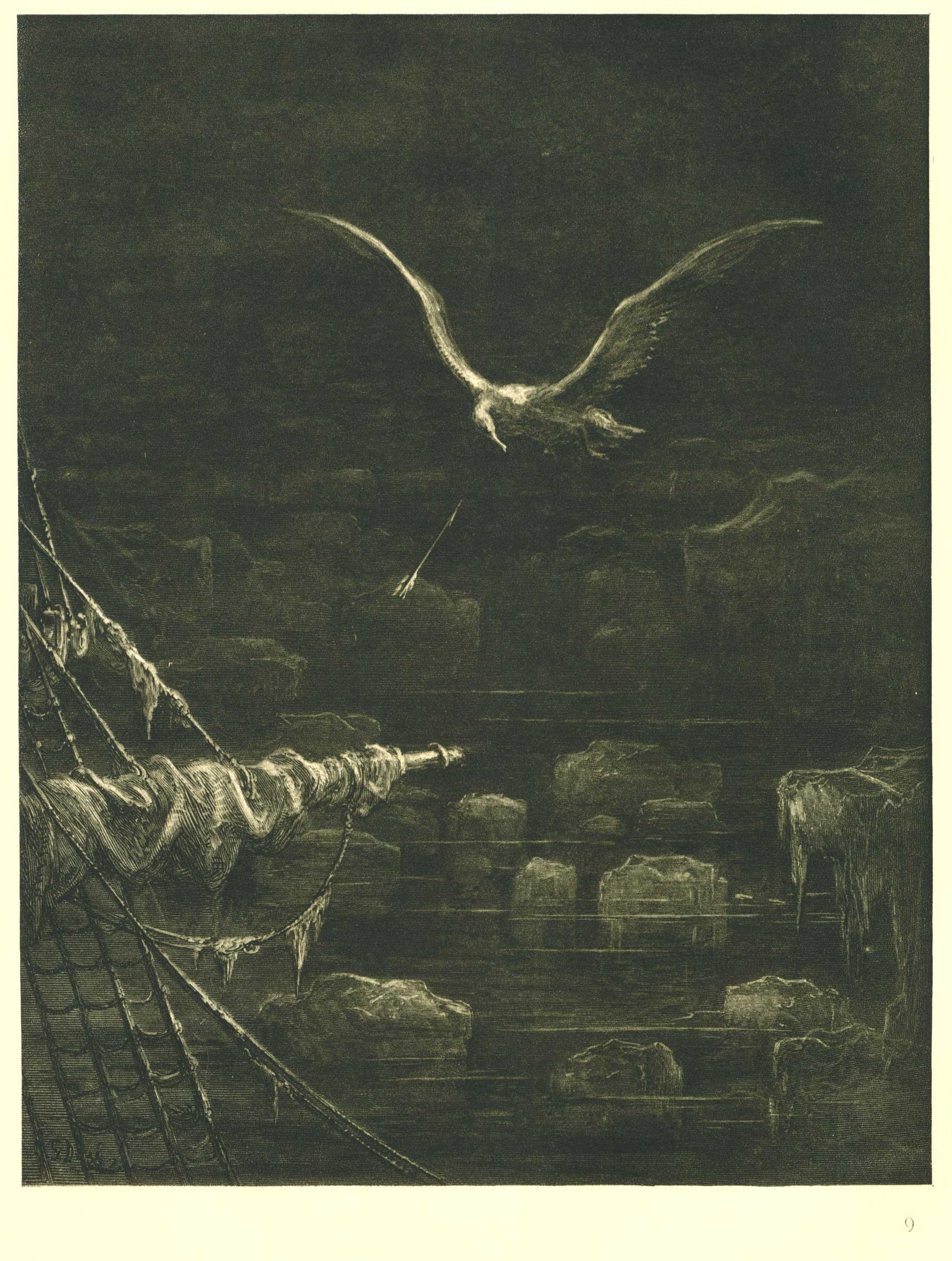 Mit der Armbrust mein schoß ich den Albatros (Beschreibung lt. Quelle)